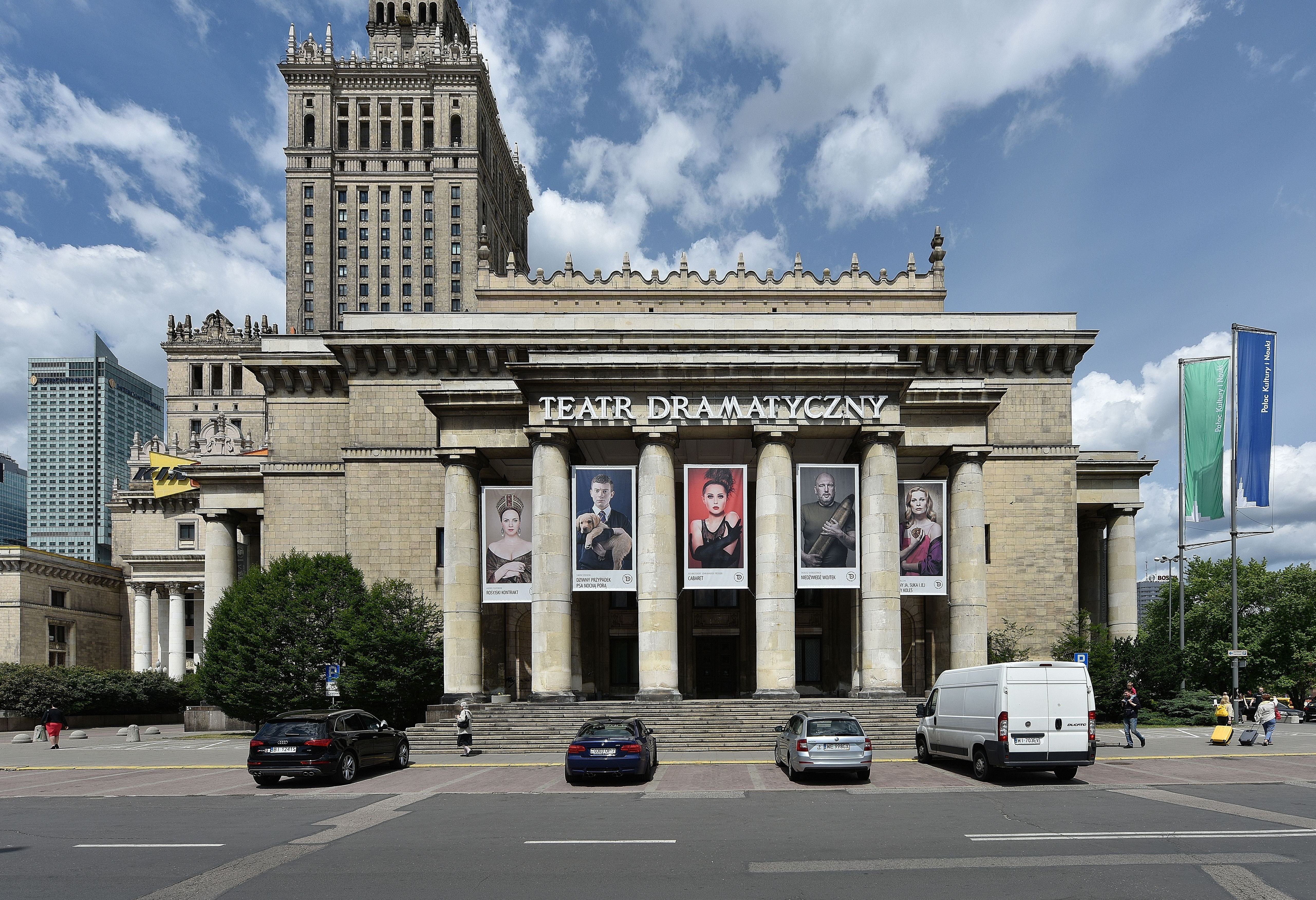 Teatr Dramatyczny w Warszawie